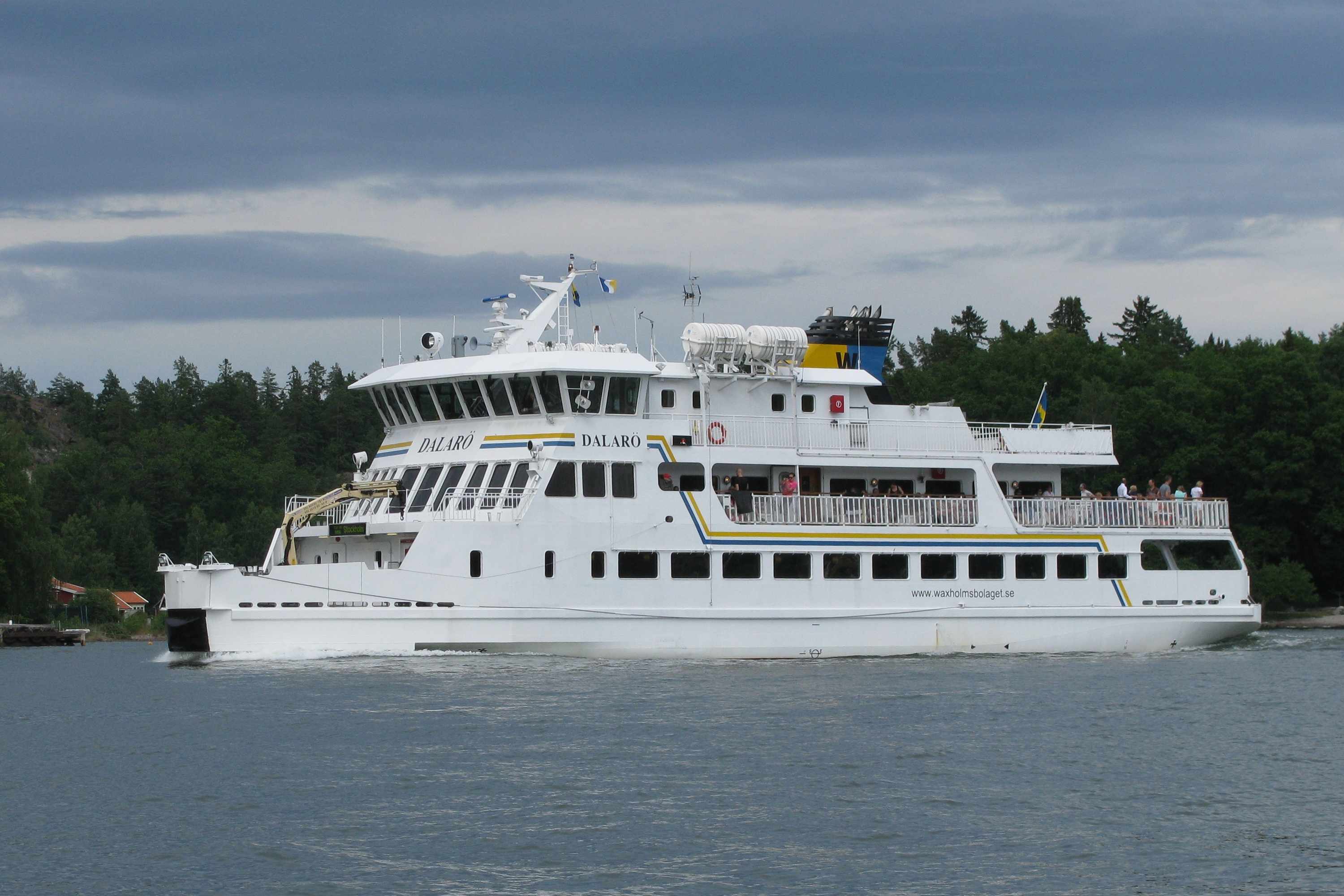 Waxholmsfärjan Dalarö i Lindalssundet i Stockholms skärgård. IMO Number: 9309174 MMSI Number: 265547840 Callsign: SGER Length: 40 m Beam: 10 m Källa: eget foto, fotograf EnDumEn 4 juli 2009.